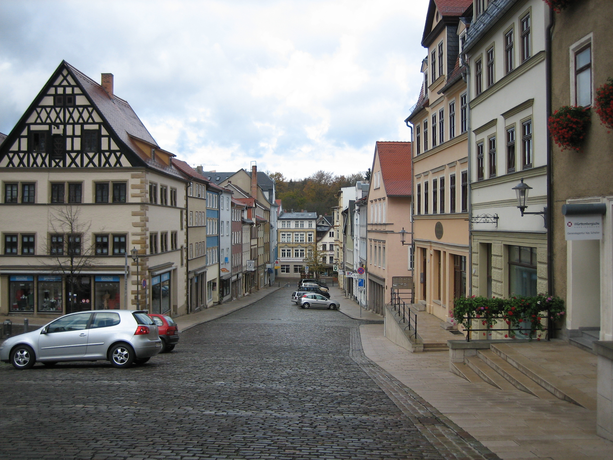 Straße im Zentrum von Pößneck, Deutschland